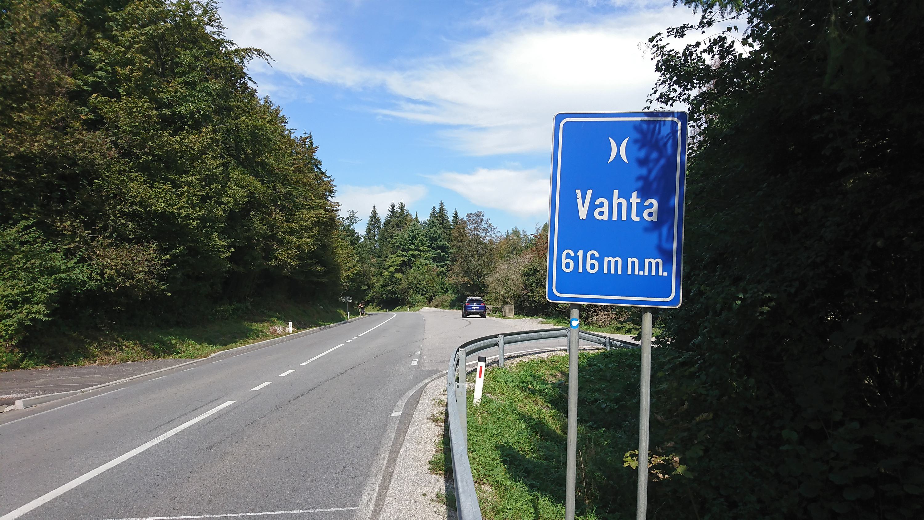 Cestni prelaz Vahta, pogled proti Novemu mestu.